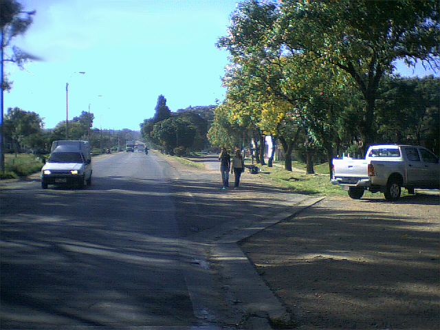 Centro del Barrio Paso de la Arena, por Av. Batlle Berres, más allá de Cno. Tomkinson